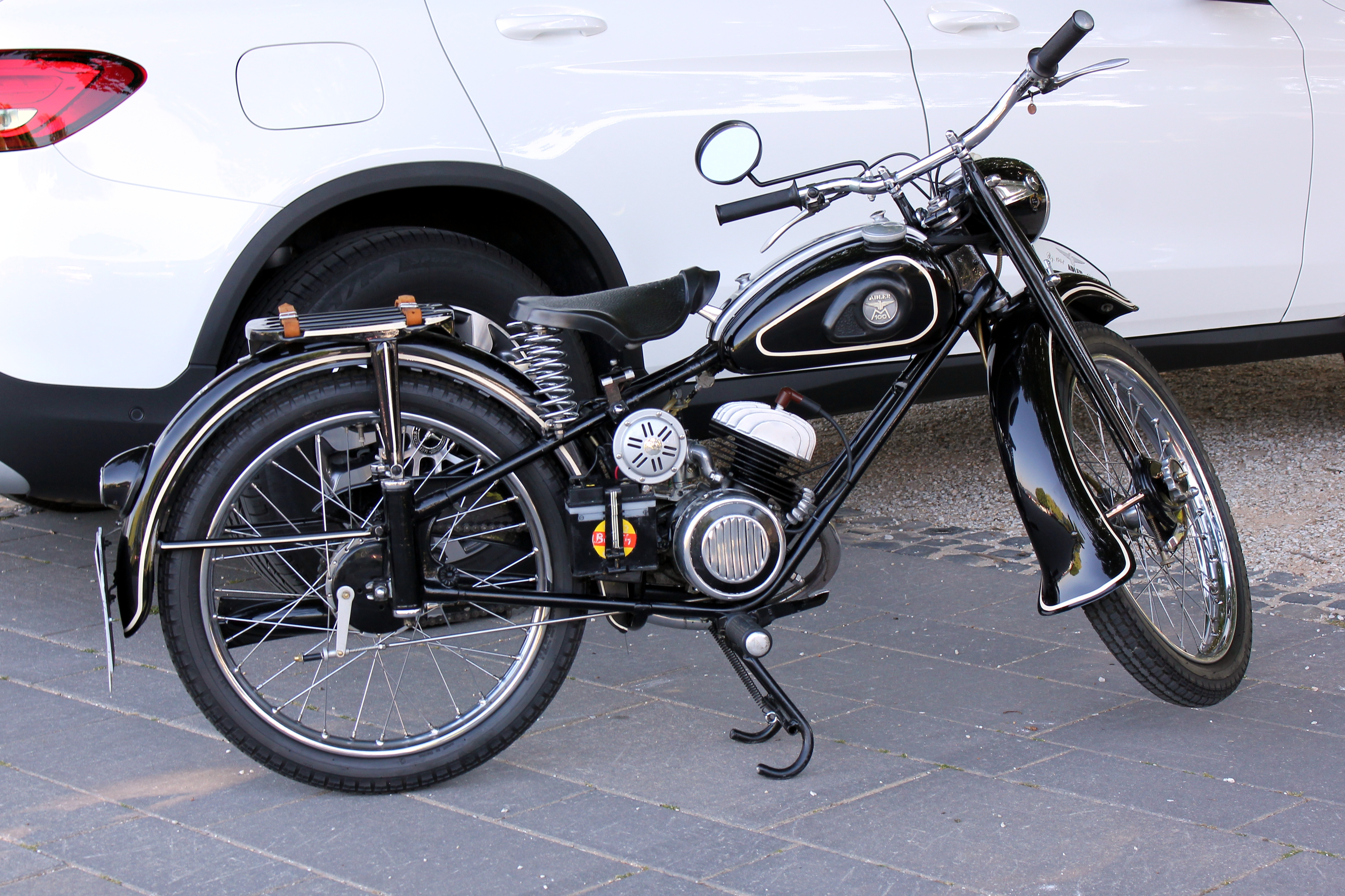 Adler M 100, Zweitaktmotor, 98,175 cm³, 3,75 PS, Baujahr 1951 (Angaben laut Typenschild))